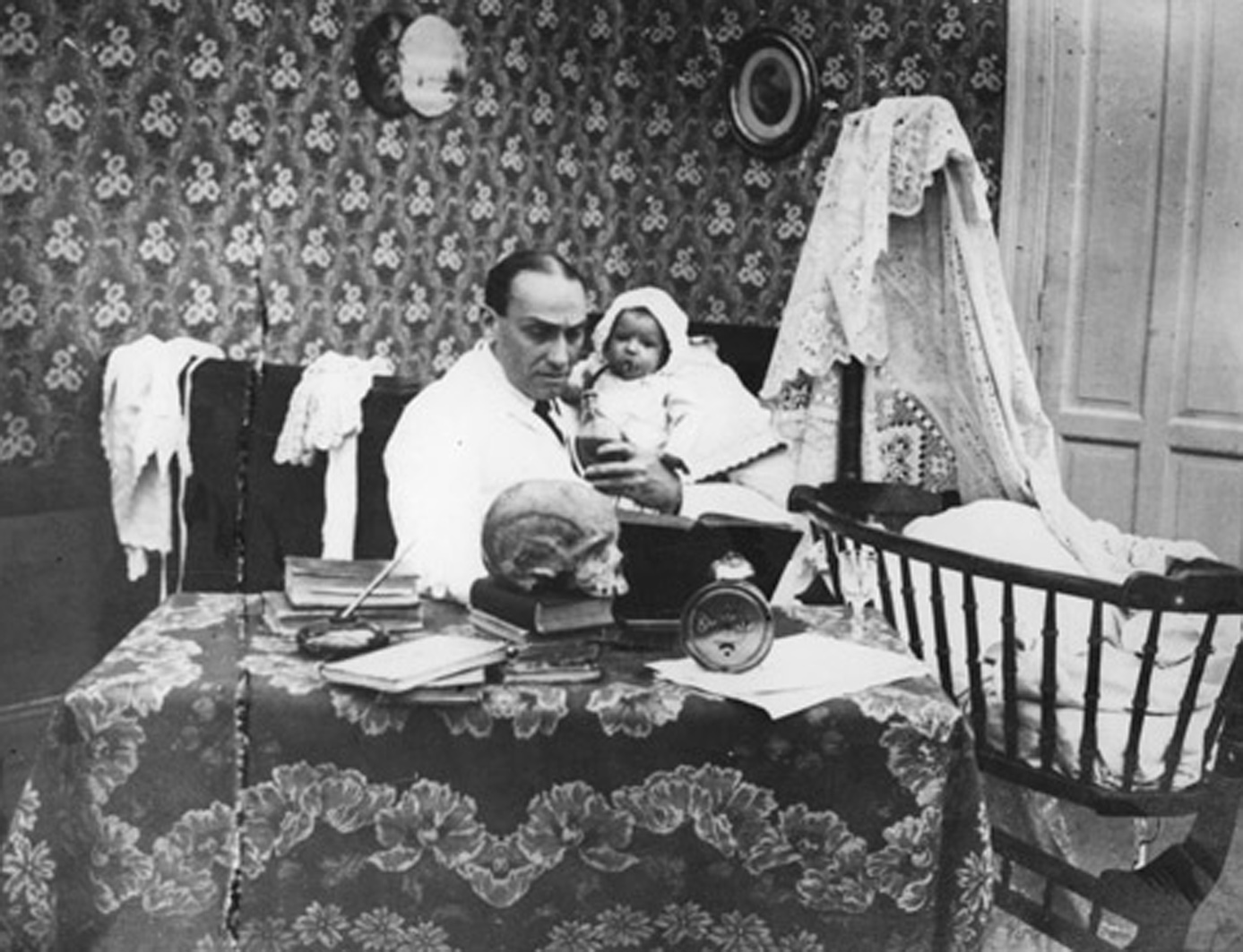 Fotograma de Hasta después de muerta